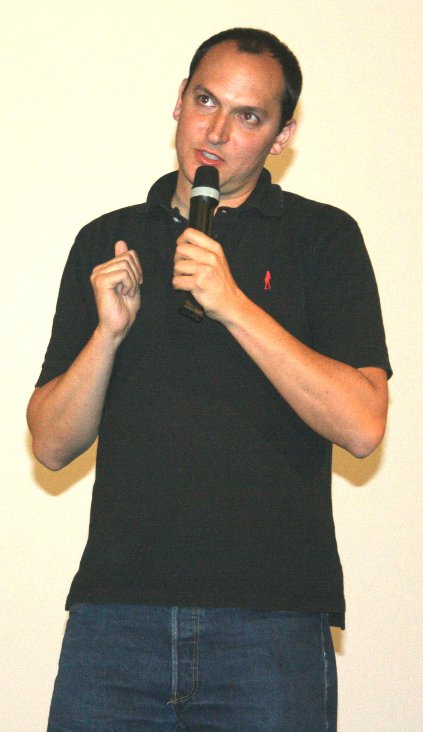 Louis Leterrier à l'avant-première de L'Incroyable Hulk diffusée à l'UGC Ciné Cité Bercy, à Paris.